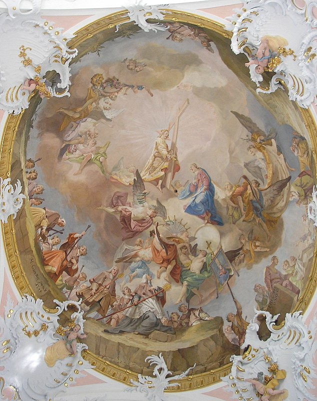 Wallfahrtskirche Herrgottsruh (Friedberg, Landkreis Aichach Friedberg, Bayerisch-Schwaben). Fresko im Langhaus. Eigene Aufnahme, Jan. 2007 / Pilgrimage church "Herrgottsruh" (Friedberg, Bavaria, Germany). Fresco (Nave). Own photo, Jan. 2007